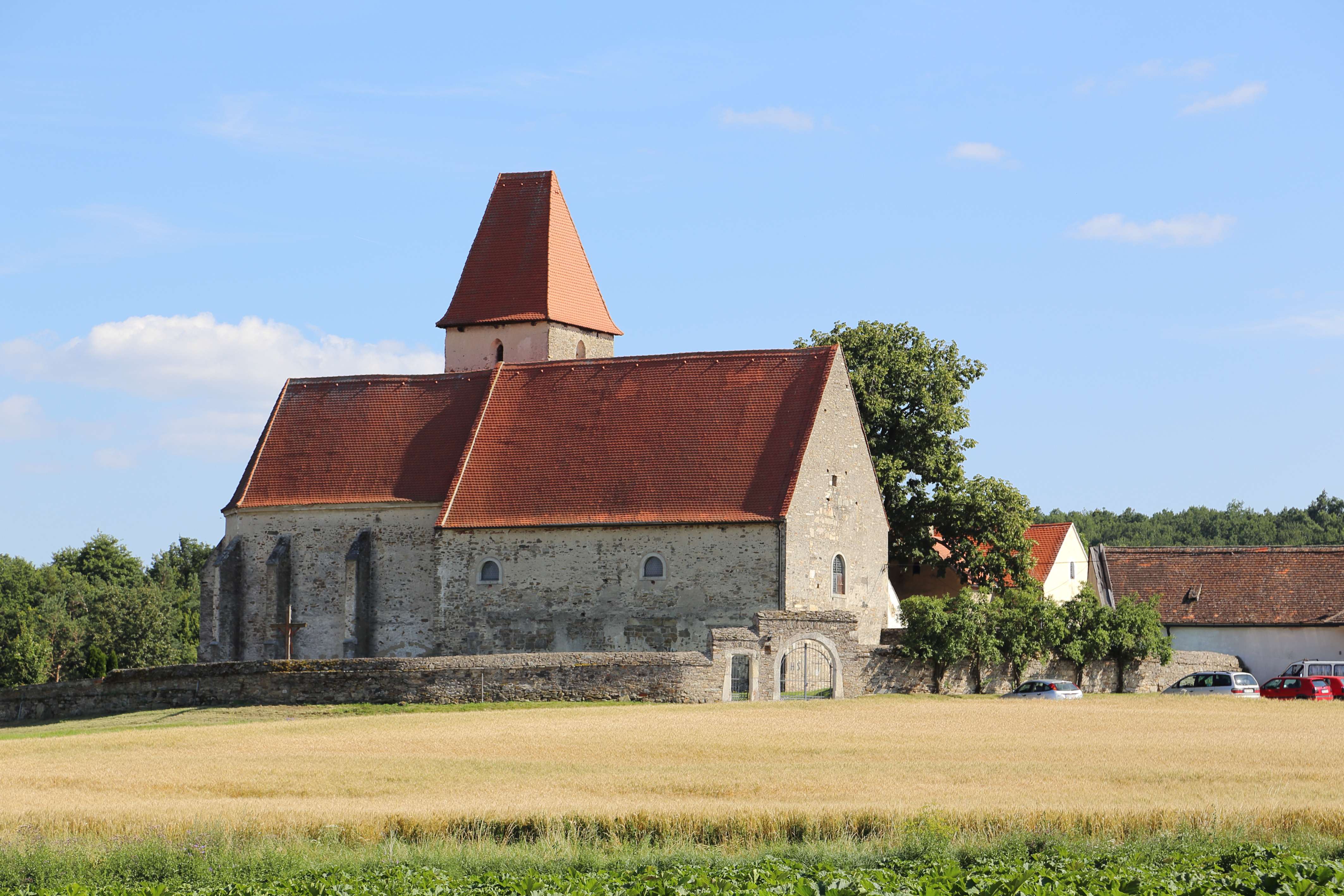 Katholische Pfarrkirche hll. Peter in Strögen, ein Ortsteil der niederösterreichischen Gemeinde St. Bernhard-Frauenhofen.